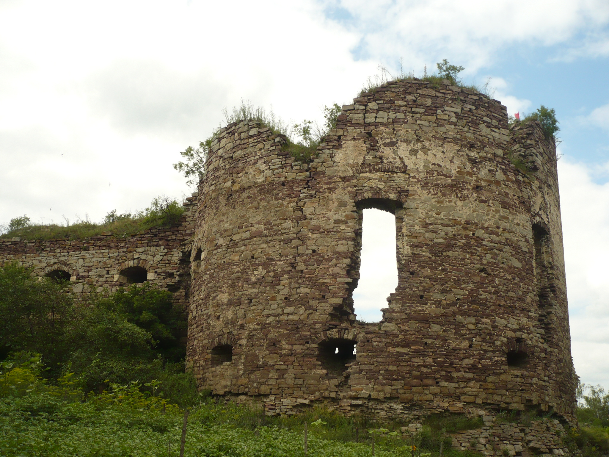 Buczacz. Zamek